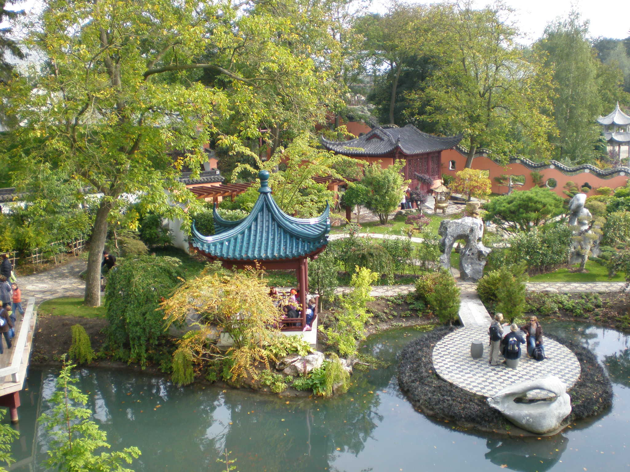 Jardin chinois du Pairi Daiza (Cambron-Casteau, Belgique)